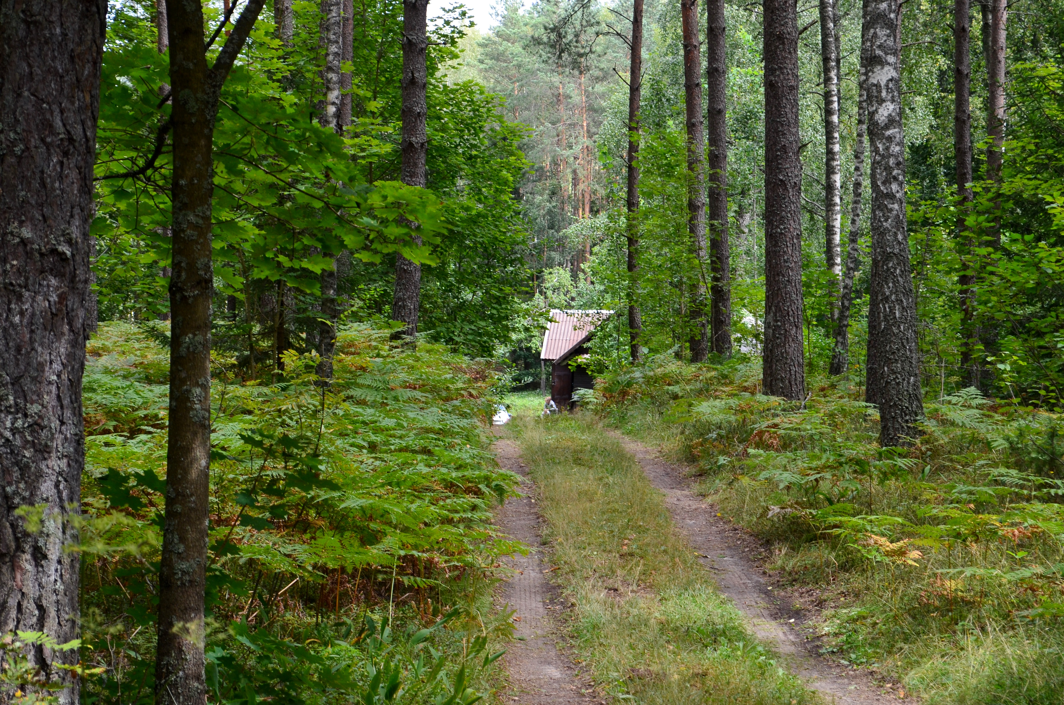 Vilkariai, Labanoro sen., Švenčionių raj.